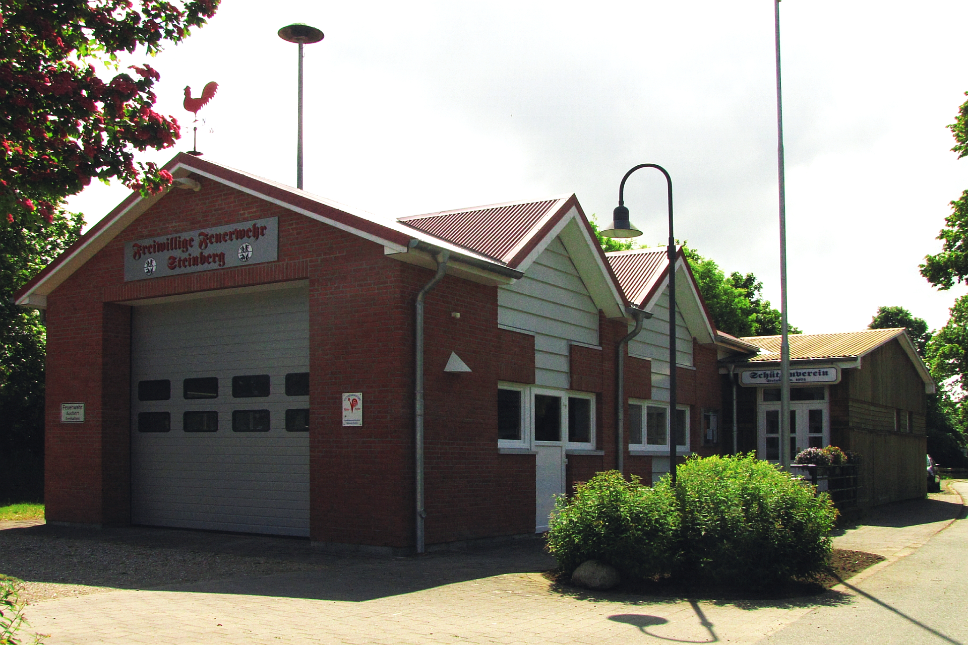 Steinberg (Ostsee) - Gebäude der Freiwillige Feuerwehr Steinberg und Vereinsheim des Schützenvereins in Steinberg - Foto 2012 Wolfgang Pehlemann IMG_7114